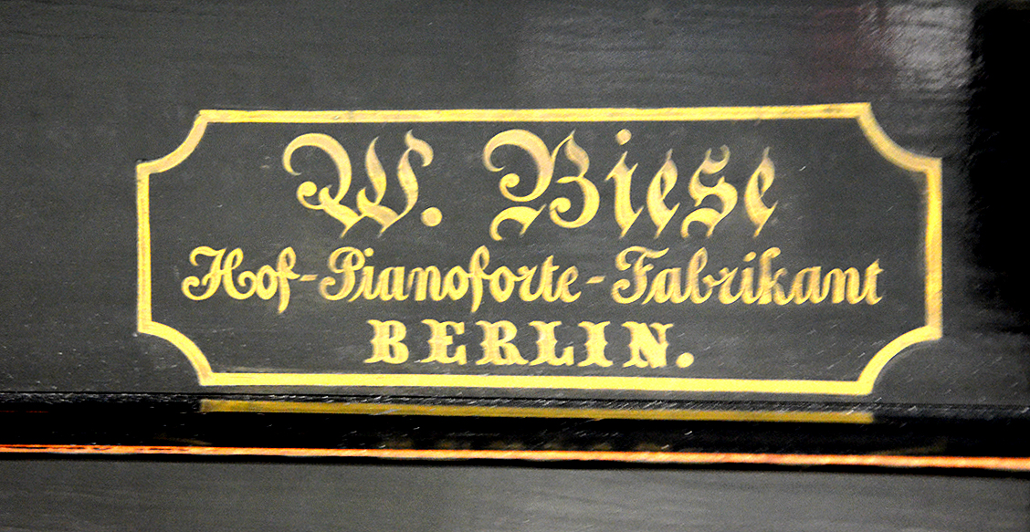 Typenschild von Wilhelm Biese, Hof-Pianoforte-Fabrikant in Berlin, gesehen am Klavier in der Bibliothek der Hannoverschen Kinderheilanstalt, Kinder- und Jugendkrankenhaus auf der Bult ...